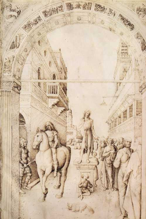 BELLINI, Jacopo Leadpoint on parchment, 426 x 286 mm Musée du Louvre, Paris